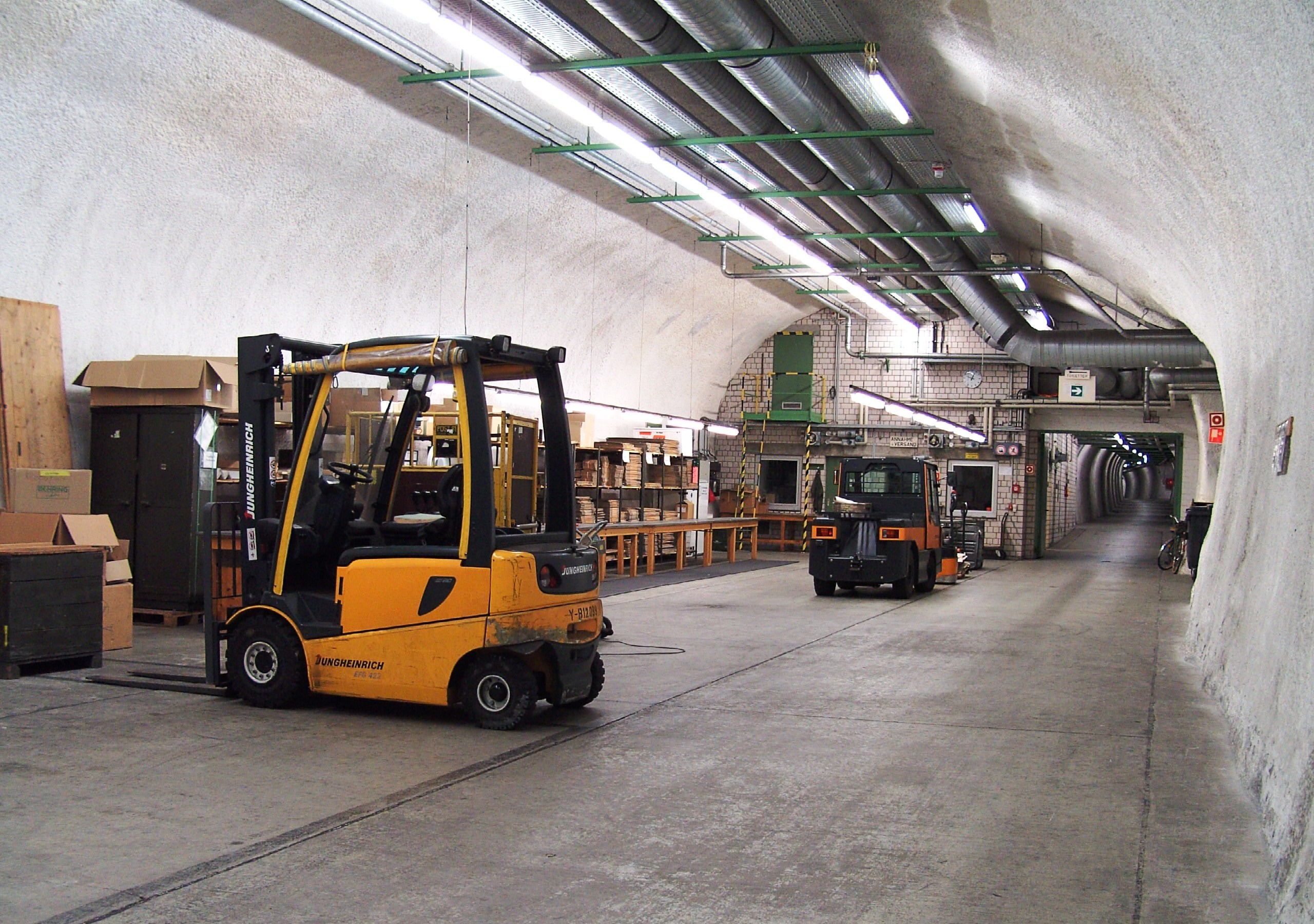 unterirdischer Depotbereich des ehemaligen Sanitätshauptdepots Lorch (Rheingau)